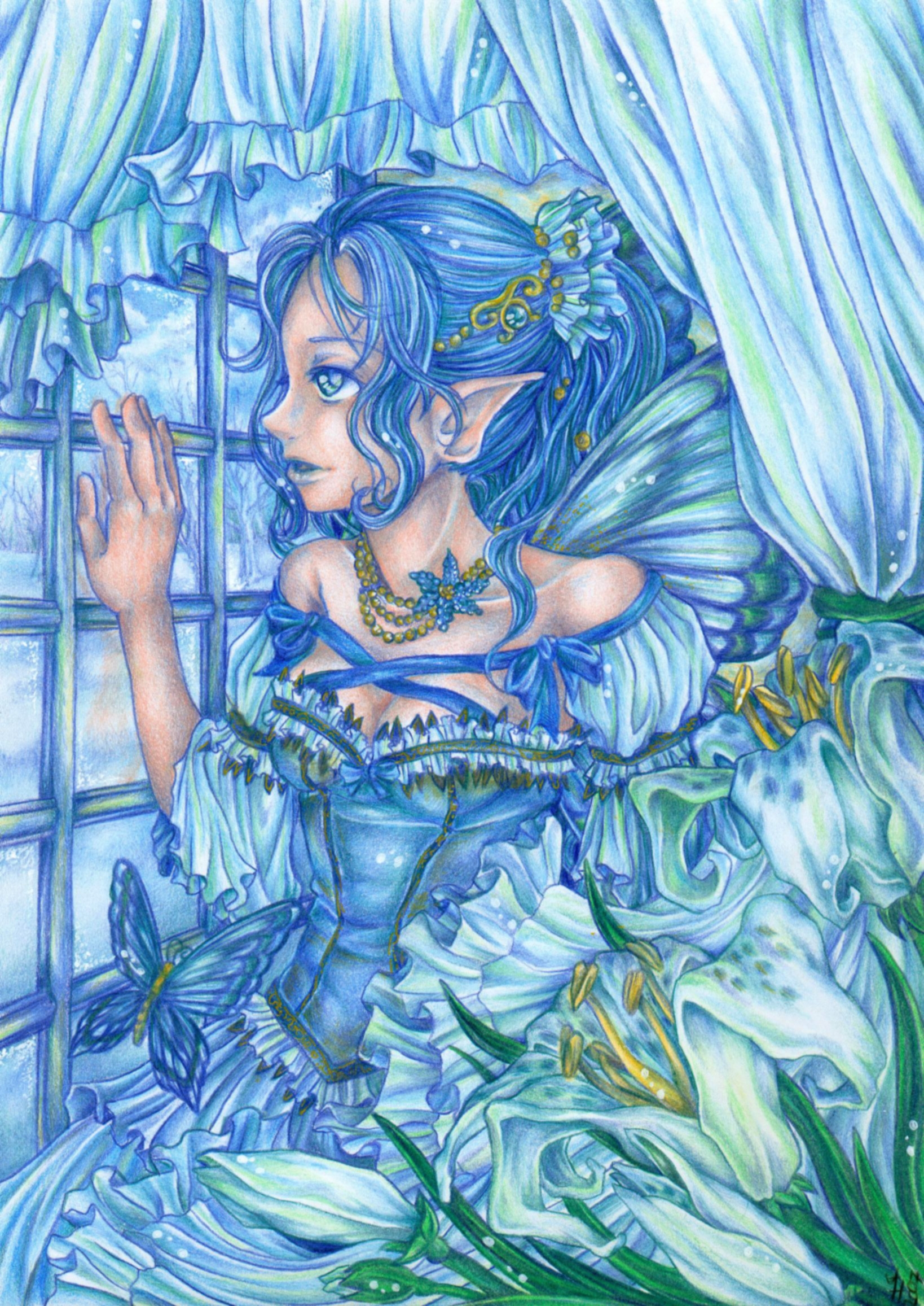 Dritter Platz des "Bilder für Wikipedia"-Wettbewerbs bei Animexx in der Kategorie Zeichentechnik. Schritte des Zeichenprozesses als Verschiedene Versionen hochgeladen.